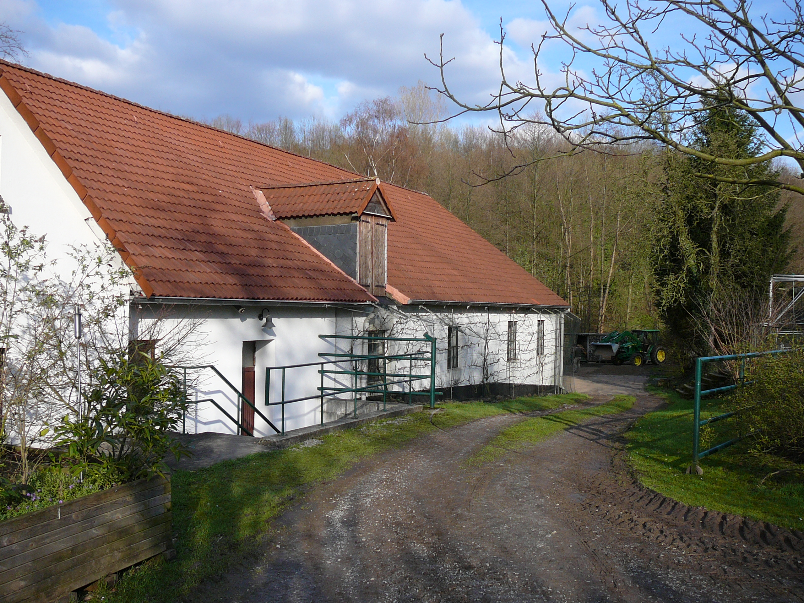 Gut Steinberg, Wuppertal/Katernberg-Uellendahl